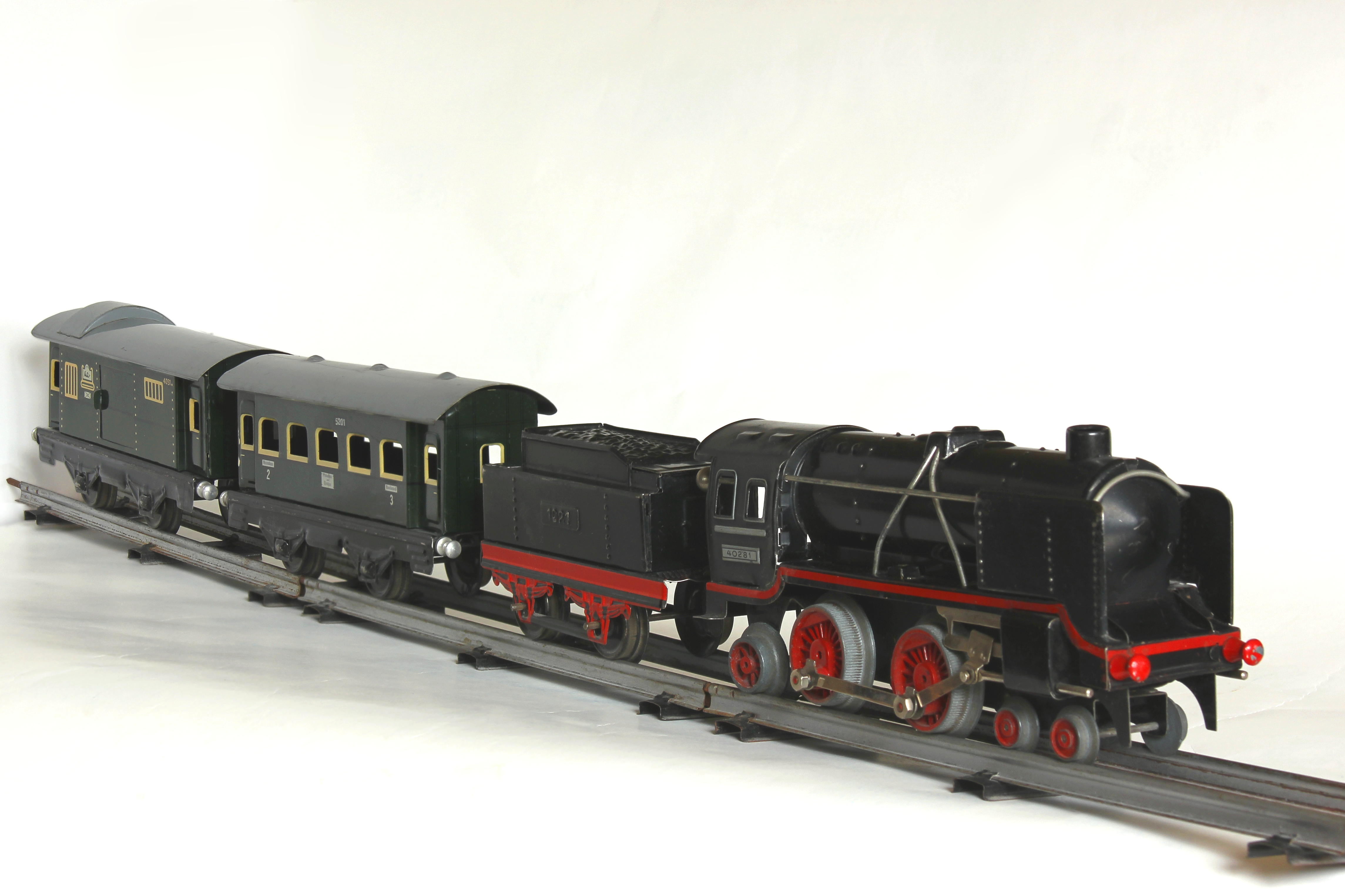 Blechspielzeug-Eisenbahn mit Uhrwerk, Spur 0, um 1950; Hersteller: Distler